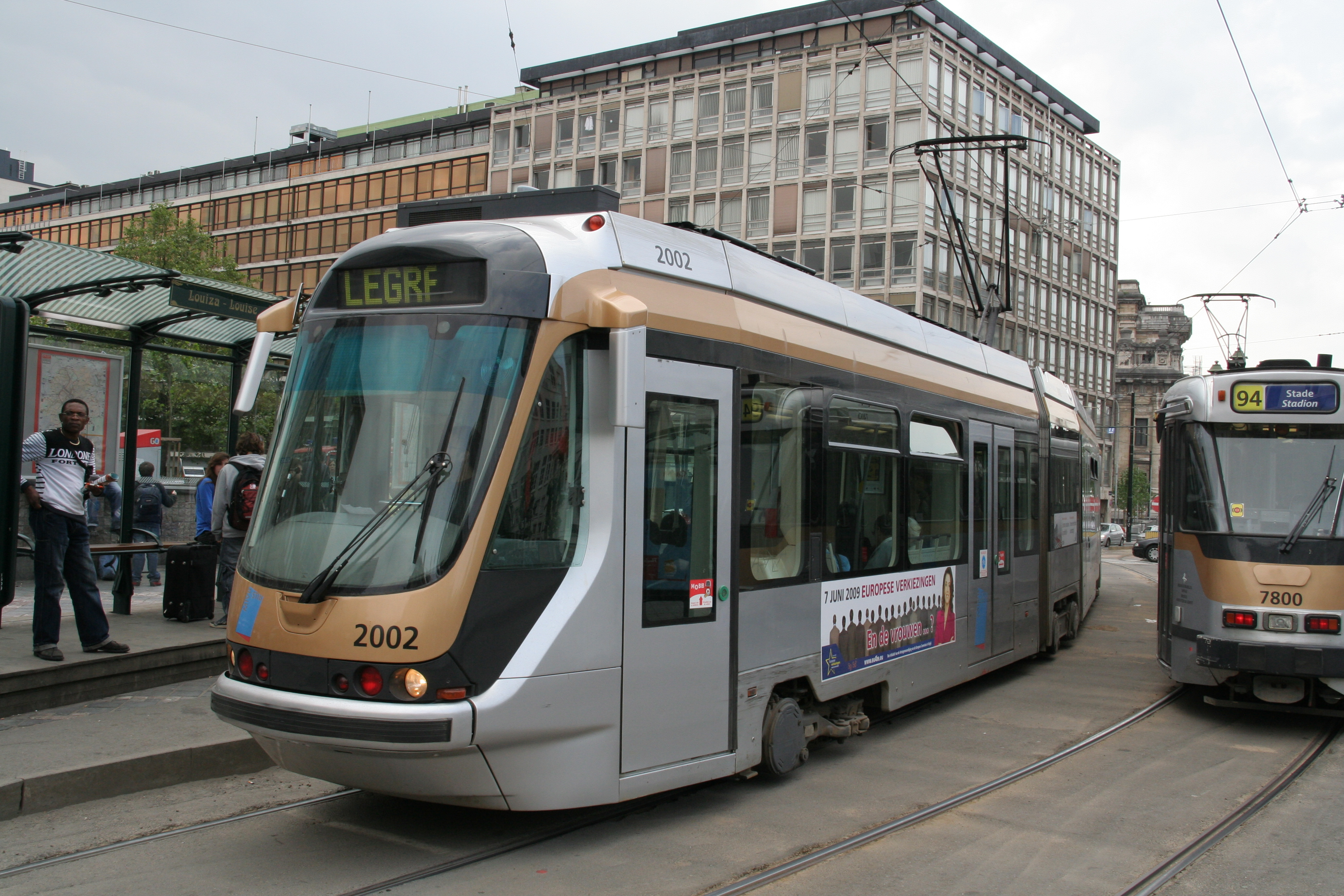 Nieuwe kleuren T2000-trams Brussel